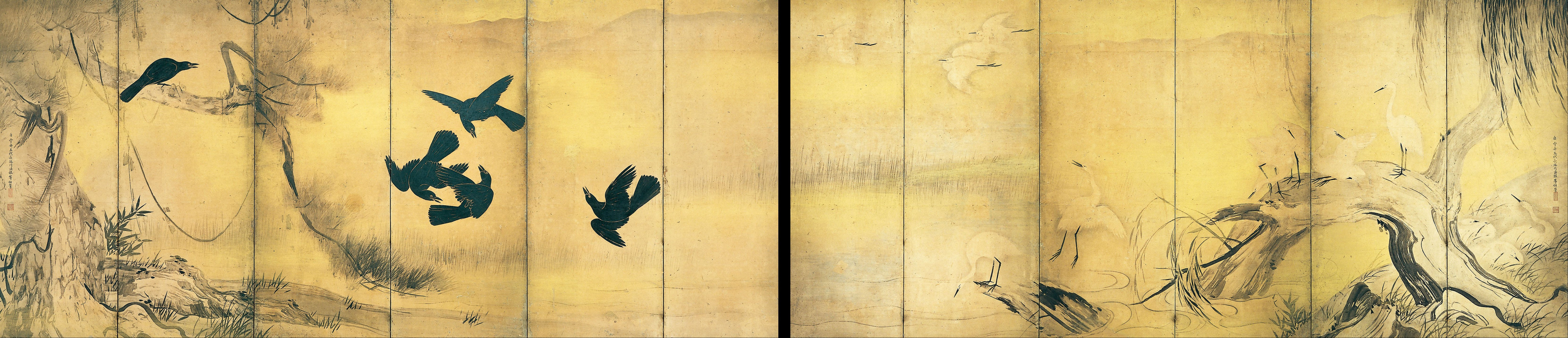 烏鷺図屏風 六曲一双 紙本墨画